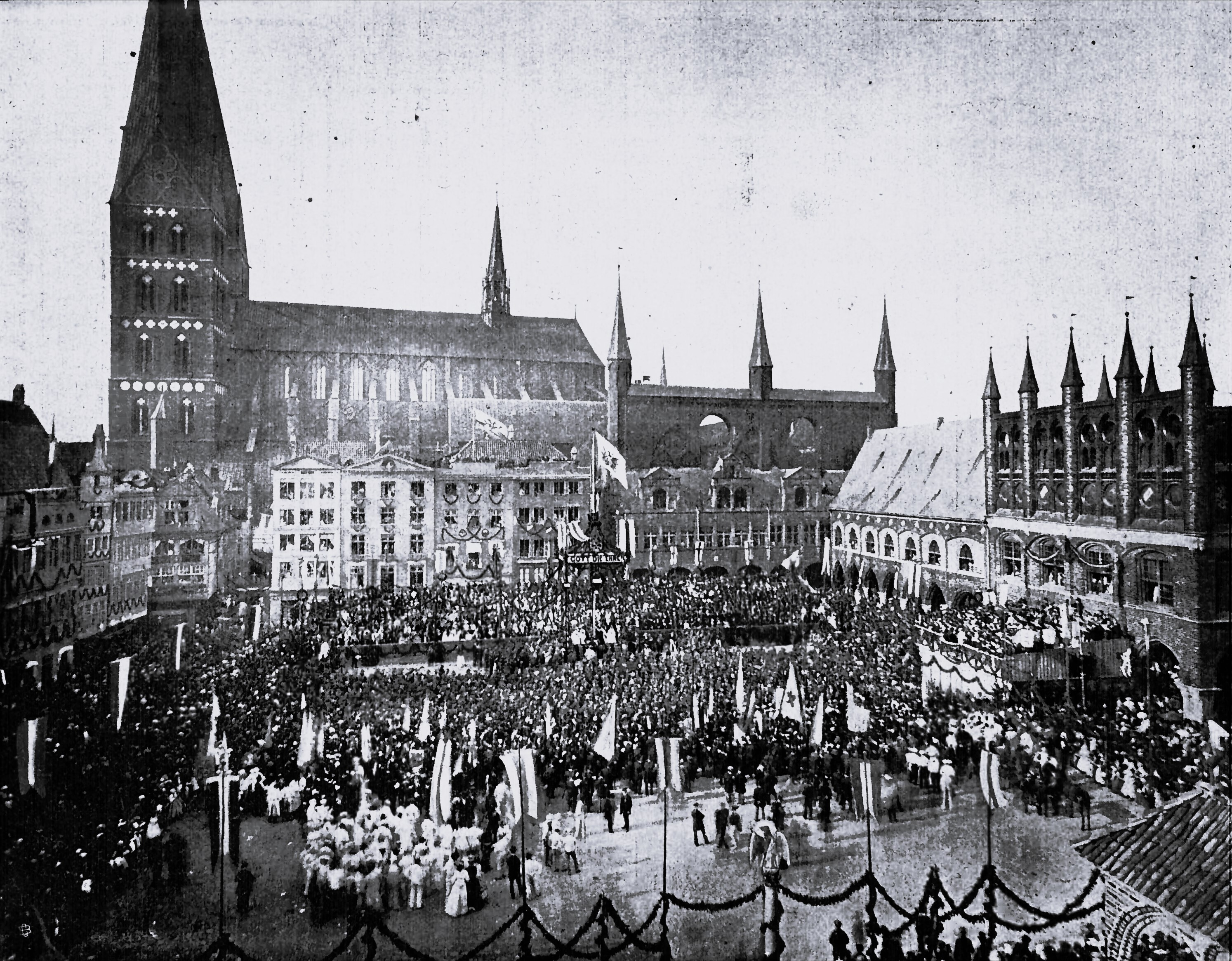 Einzug der siegreichen Truppen am 18. Juni 1871. Dieses Bild wurde in "Bismarck - Härte und Empfindsamkeit", Deutsche Dokumentation 2014 von Wilfried Hauke, gelaufen u. a. auf arte, 21. Februar 2015, verwendet.